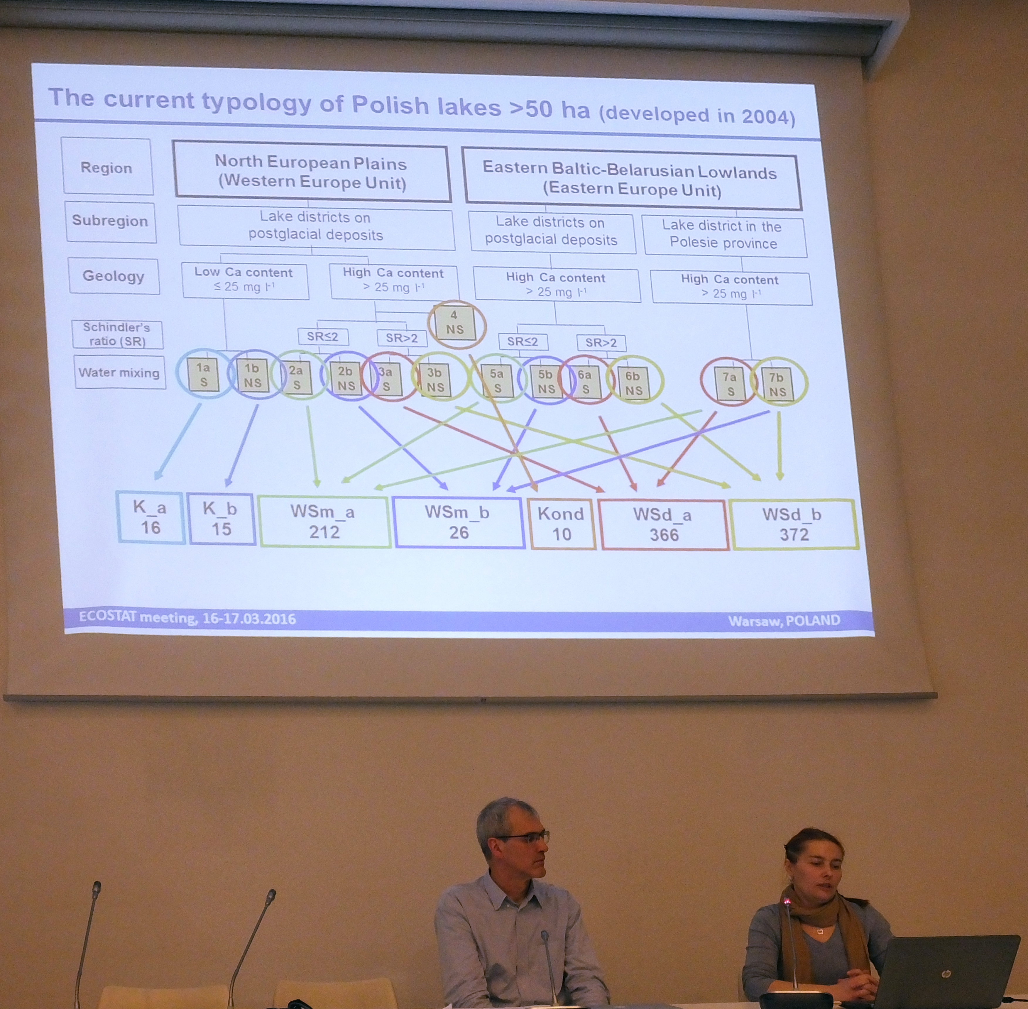 31 spotkanie grupy roboczej Ecostat 16-17 marca 2016 w Warszawie. Wouter van de Bund – Joint Research Centre i Agnieszka Kolada – Instytut Ochrony Środowiska